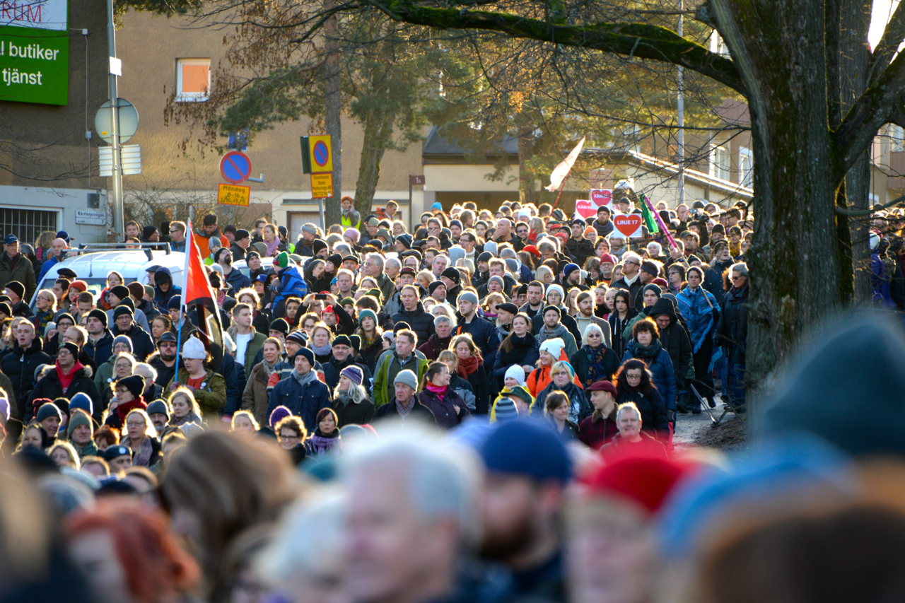 Antirasistdemonstrationerna i Kärrtorp den 22 december 2013.